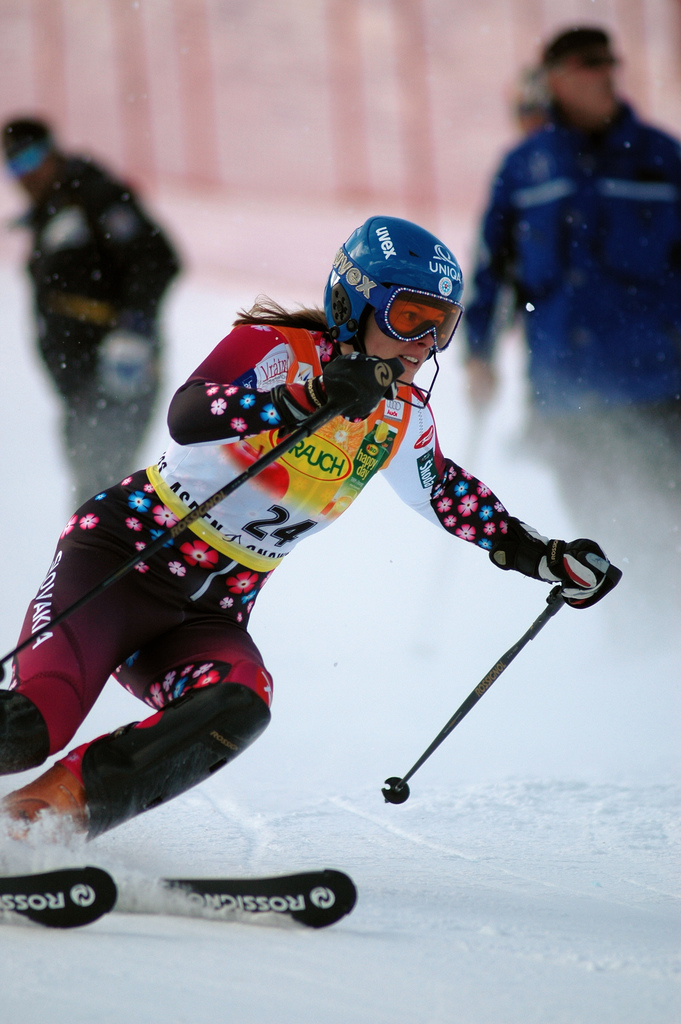 Veronika Zuzulová in Aspen